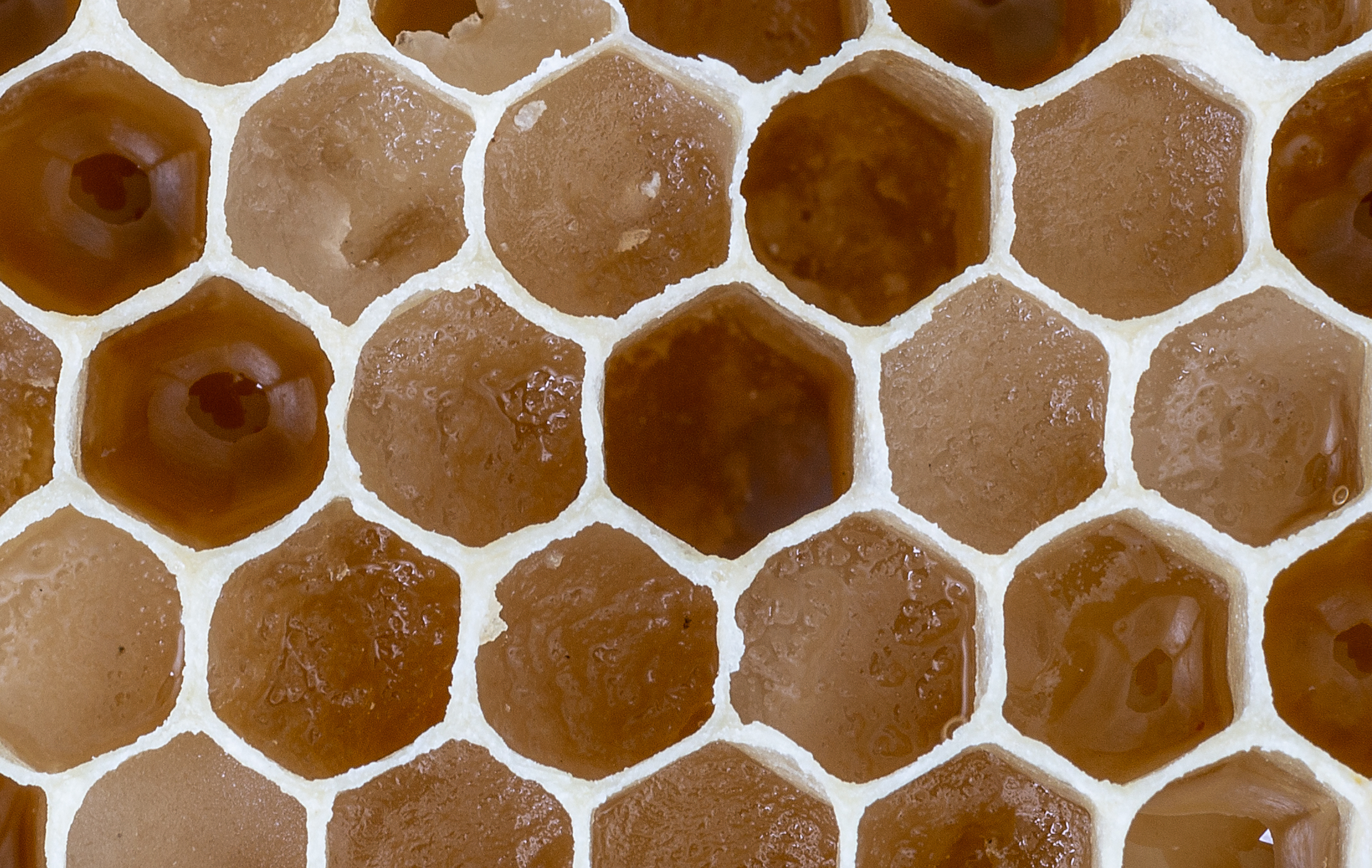 Honigwabemit Melezitose (Zementhonig).